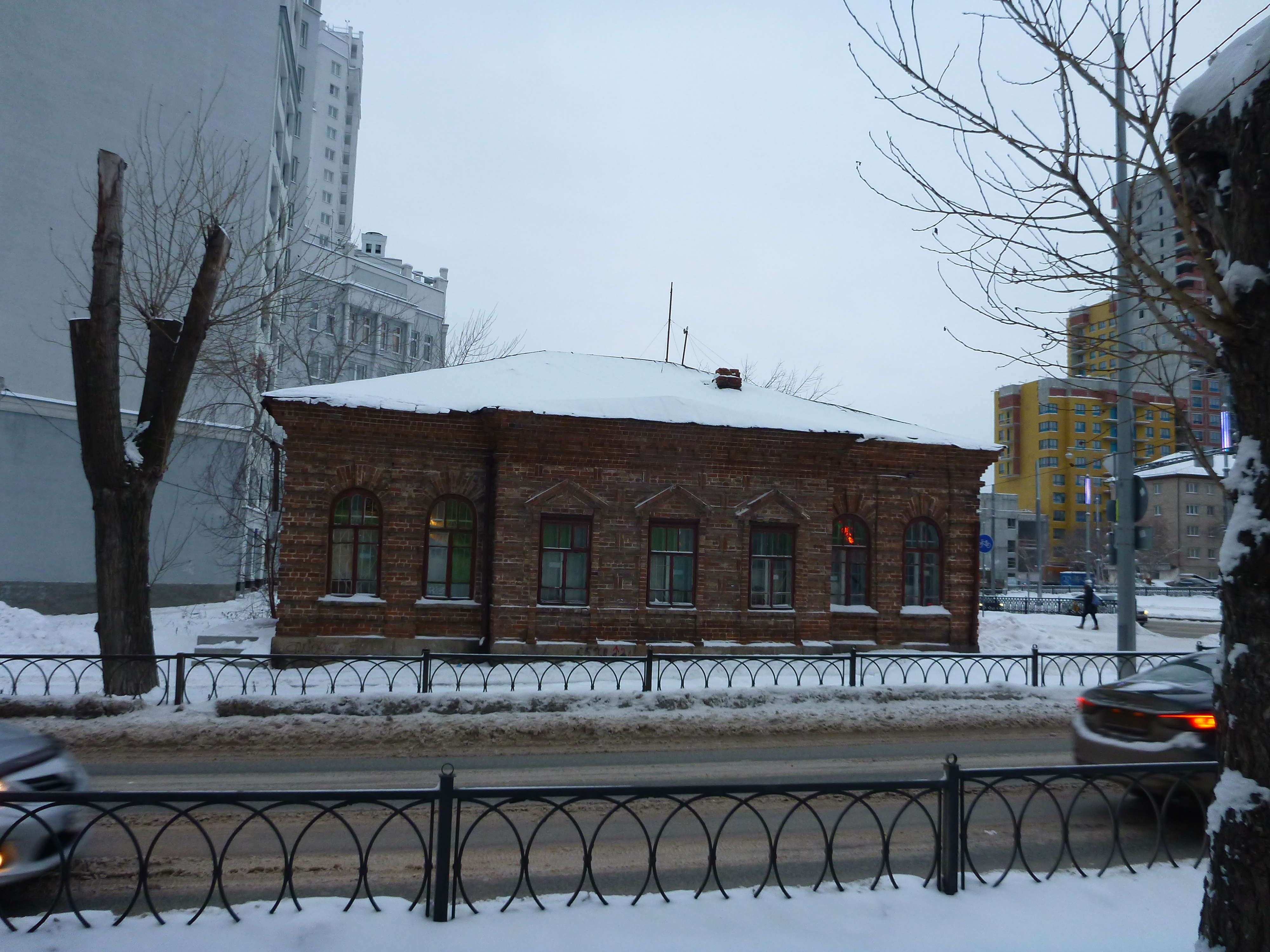 Дом в Екатеринбурге Мельникова 14 1923 года постройки